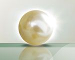 Mecklenburgische Versicherungsgruppe